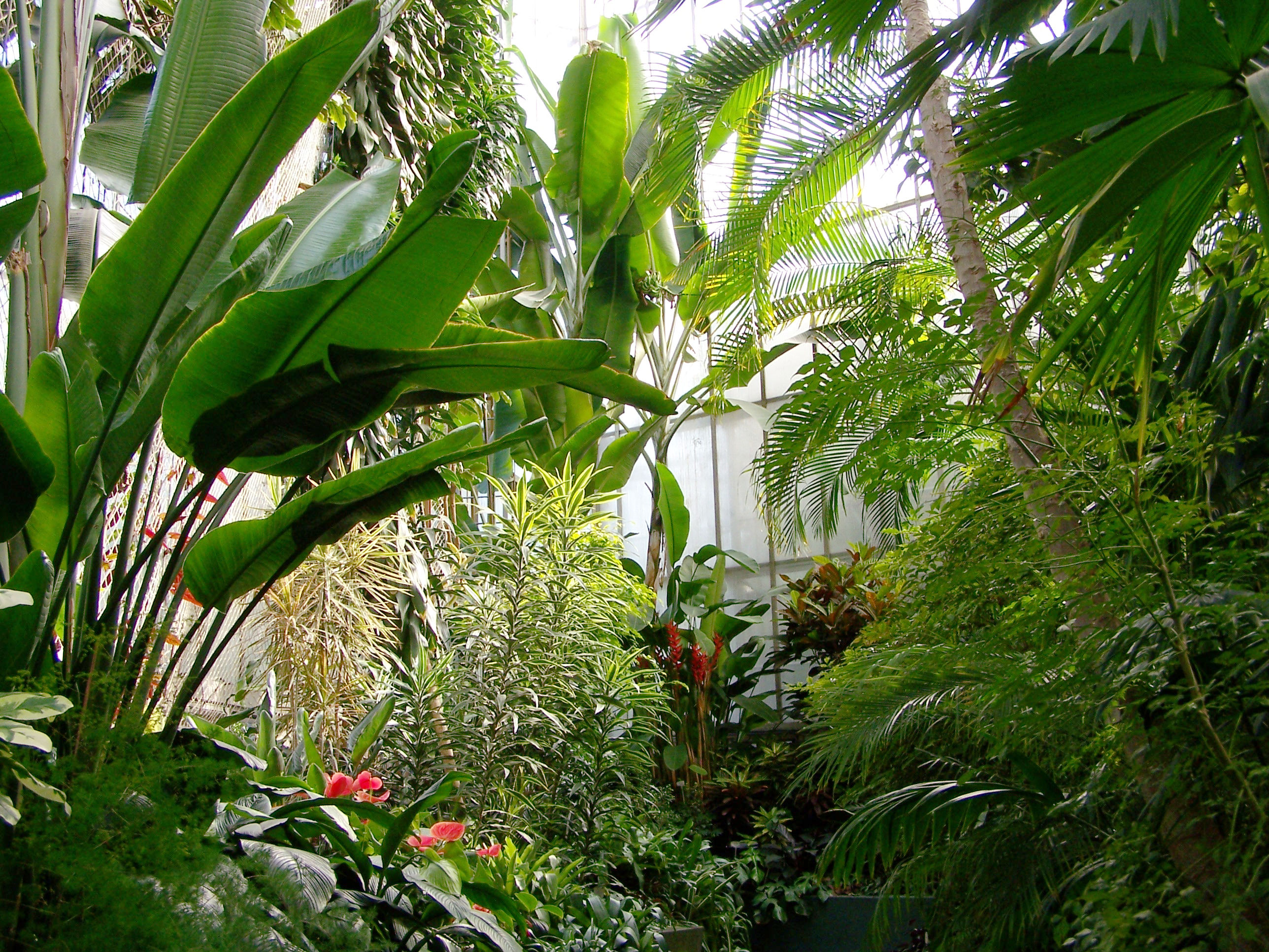 Palmenhaus in Gleiwitz in Oberschlesien.